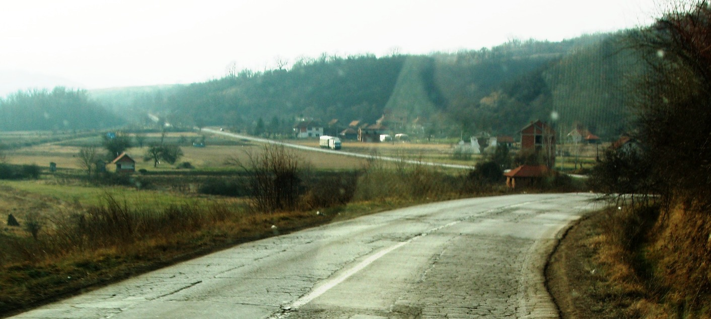 Ново Село, Куршумлија